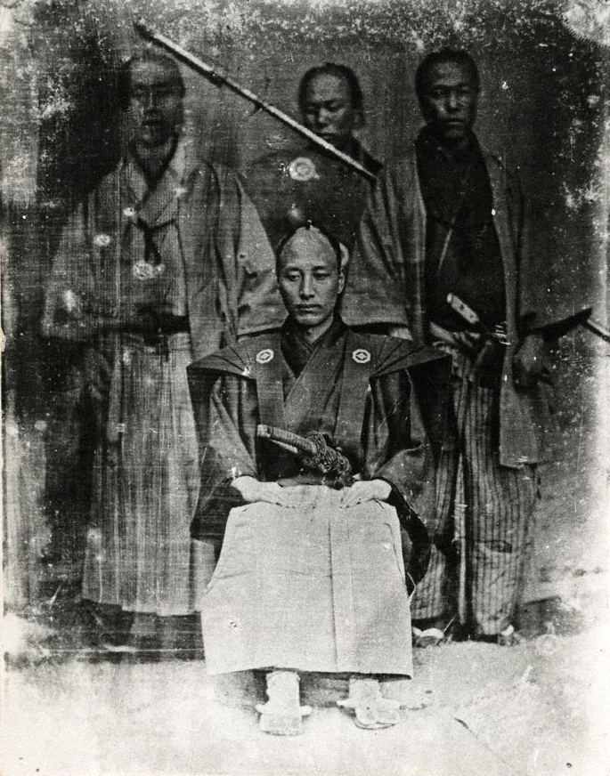 1854年、ペリー艦隊の写真師エリファレット・ブラウンが箱館で撮影。日本最古の銀板写真のうちの1枚。重要文化財。